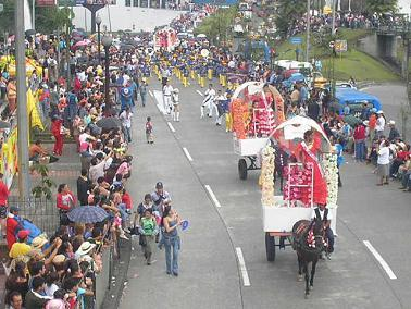 Desfile de las Carretas del Rocío.